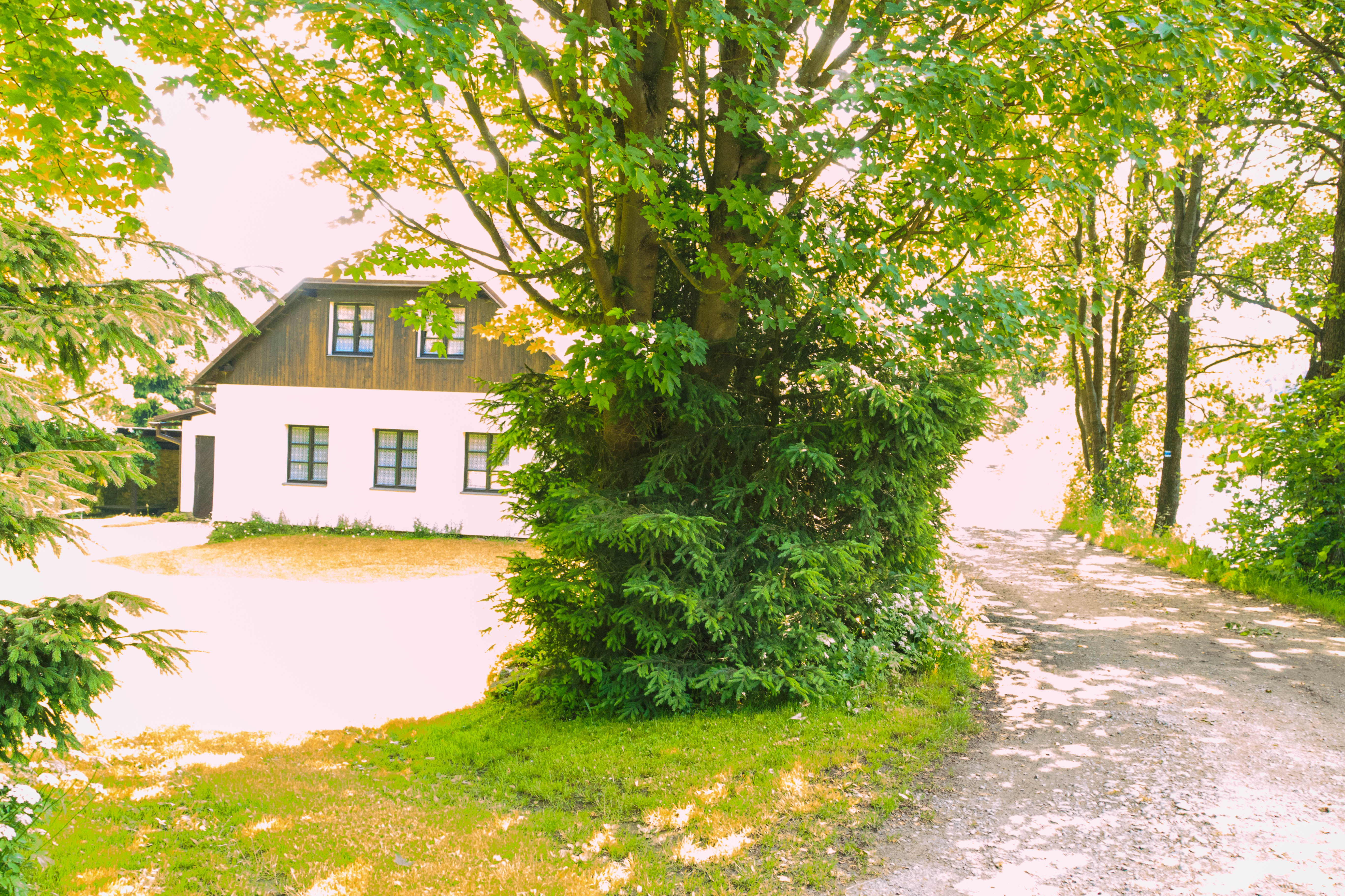 Mlýn pod rybníkem Šantrůček